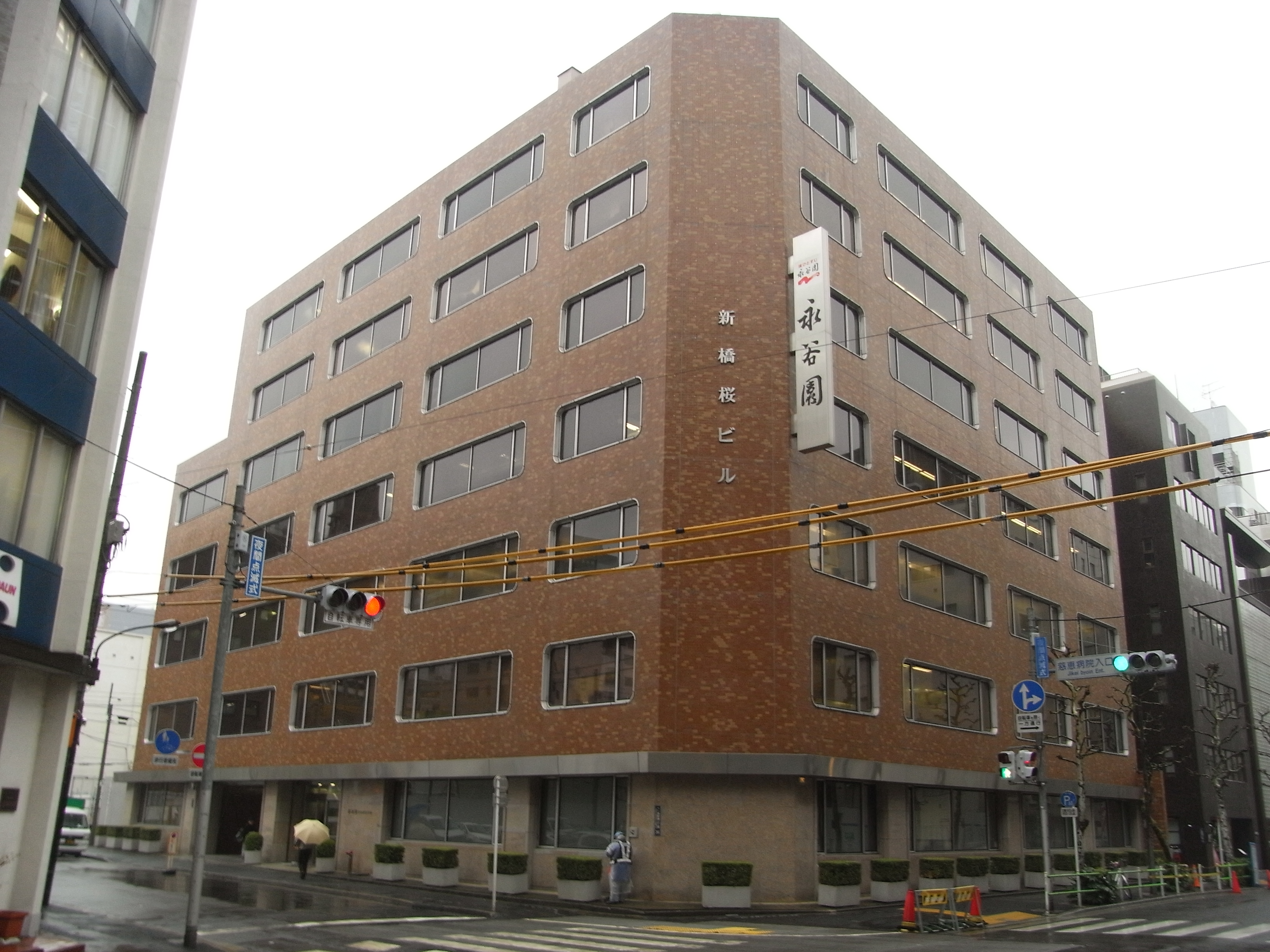 西新橋の永谷園本社の外観です。